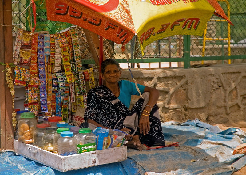 Gutka street vendor, India